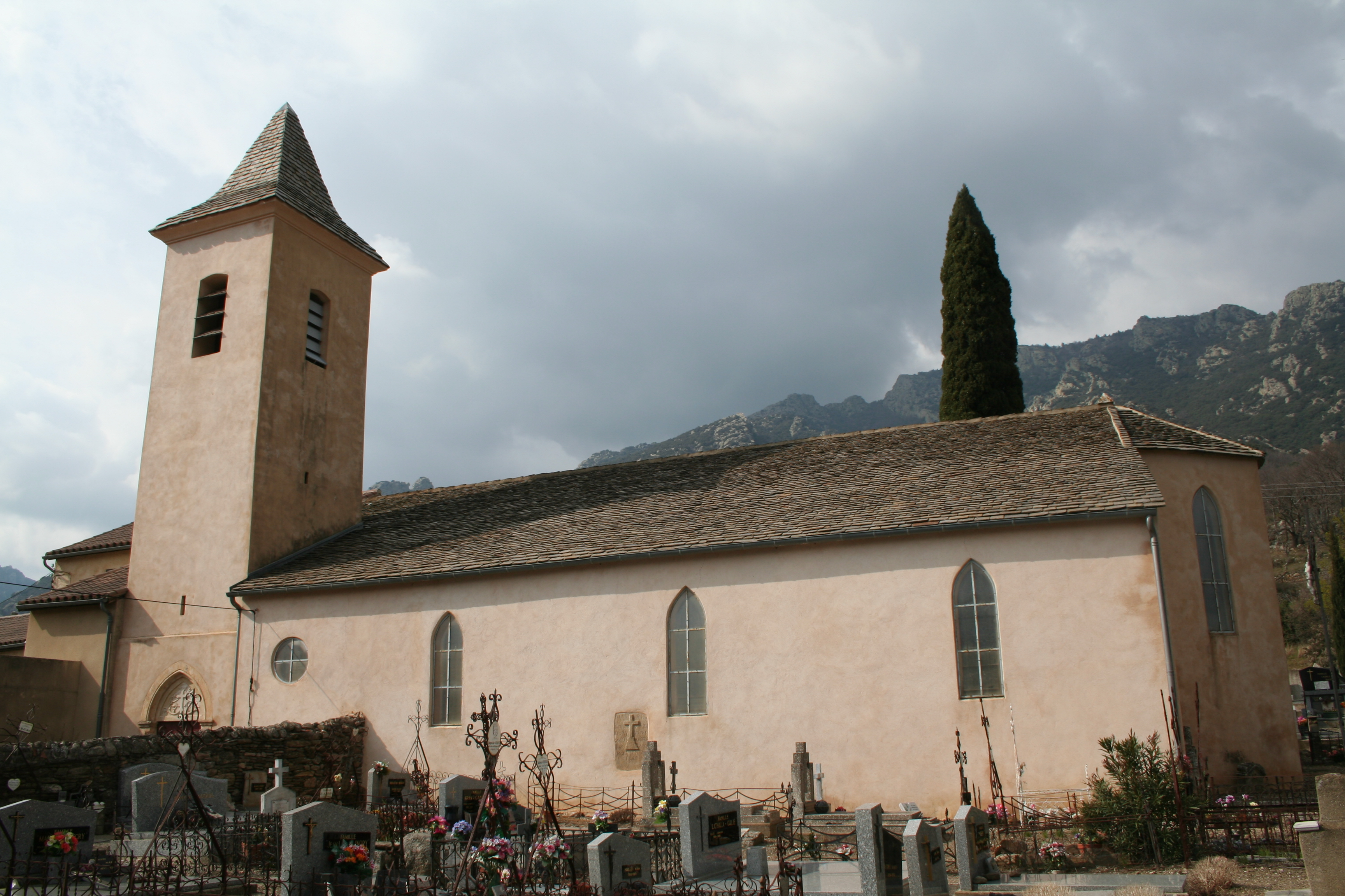 Saint-Martin-de-Larçon (Hérault) - église Saint-Martin.